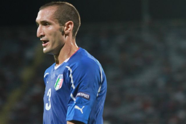 Il giocatore italiano durante Italia-Slovenia di qualificazione agli Europei 2012